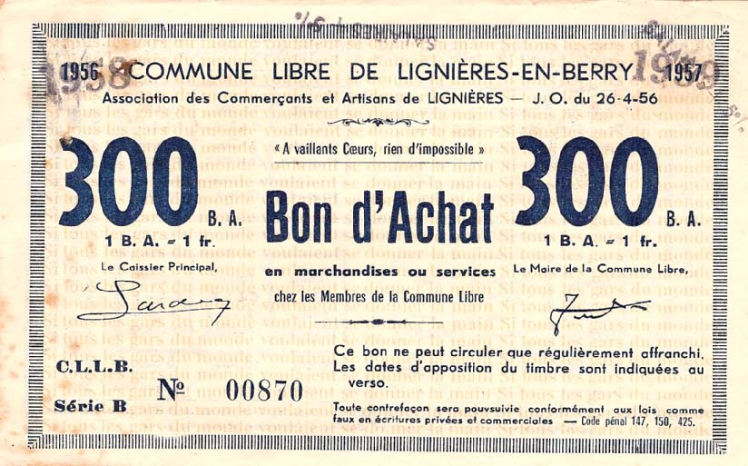 Bon d'achat avec le chéque qui va bien, dans le magasin au choix mais en France